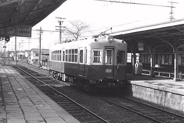 旧修学院駅の様子1 上りホーム入口付近から一乗寺駅方向